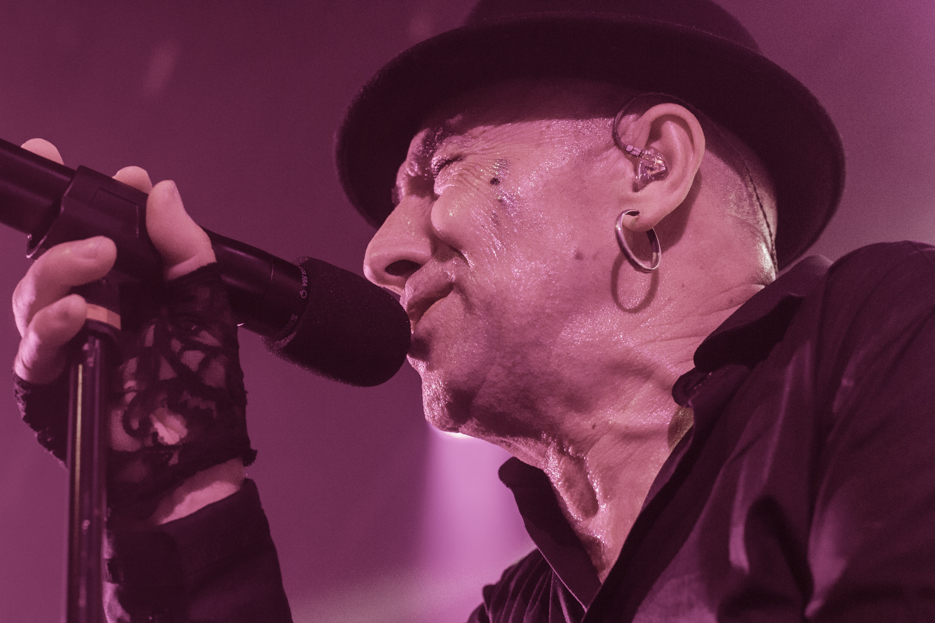 Dkluba Intxaurrondo Kultur Etxea 2018/5/11 Argazkiak/Fotos: Iñigo Ibañez